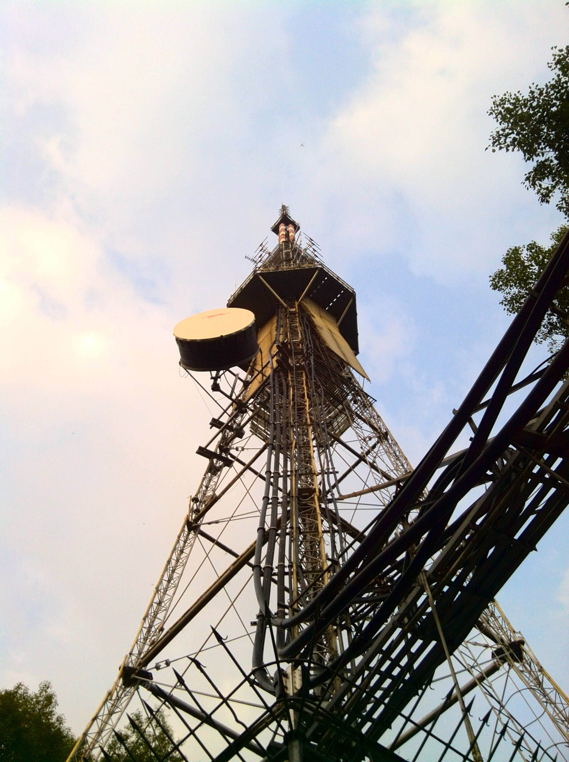 中华人民共和国广东省潮州广播电视塔，矗立于西湖公园的海拔73米的西湖山上，塔高65米。